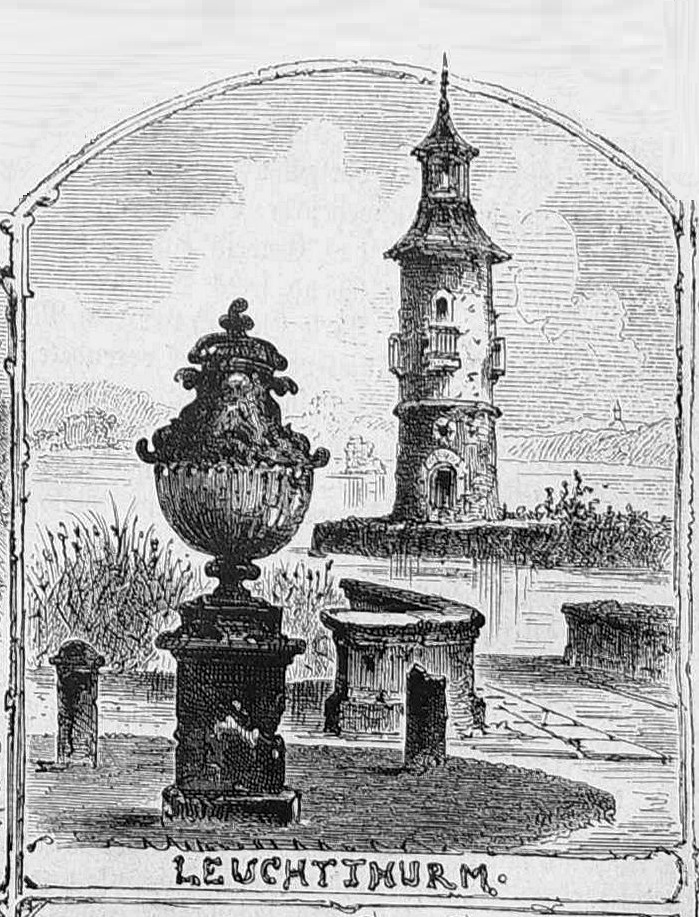 Darstellung des Leuchtturms bei Schloss Moritzburg. Die Zeichnung ist Teil einer Ansicht von Schloss Moritzburg, die 1871 in der Zeitschrift Die Gartenlaube veröffentlicht wurde.